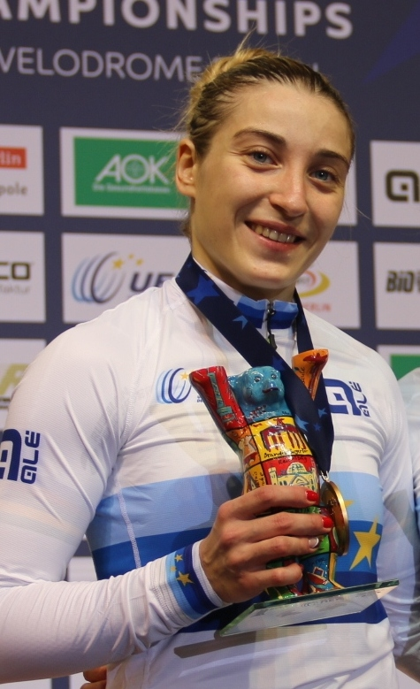 Daria Shmeleva (l.) und Anastasiia Voynova, Gold im Teamsprint